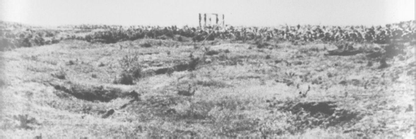 Izgled bubanjskih jama (1945. godine) iz kojih su pred kraj okupacije iskopani i spaljeni leševi.Snimak posleratne državne komisije za utvrđivanje ratnih zločina